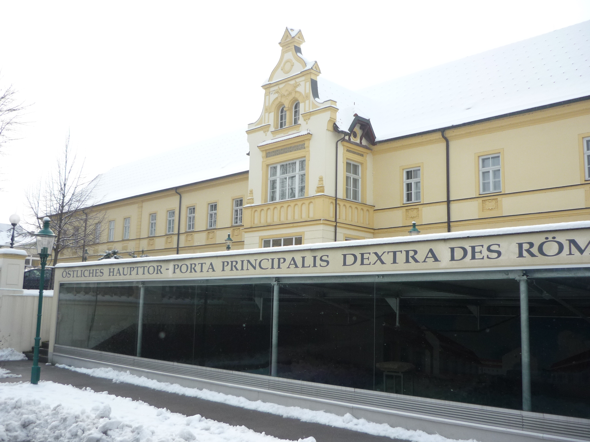 Museum des restaurierten östlichen Lagertors